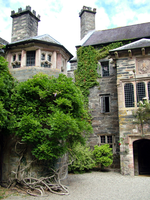 Gwydir Castle